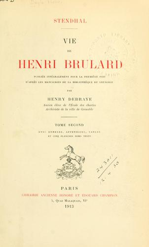 Couverture d'Henry Brulard de Stendhal, 1913